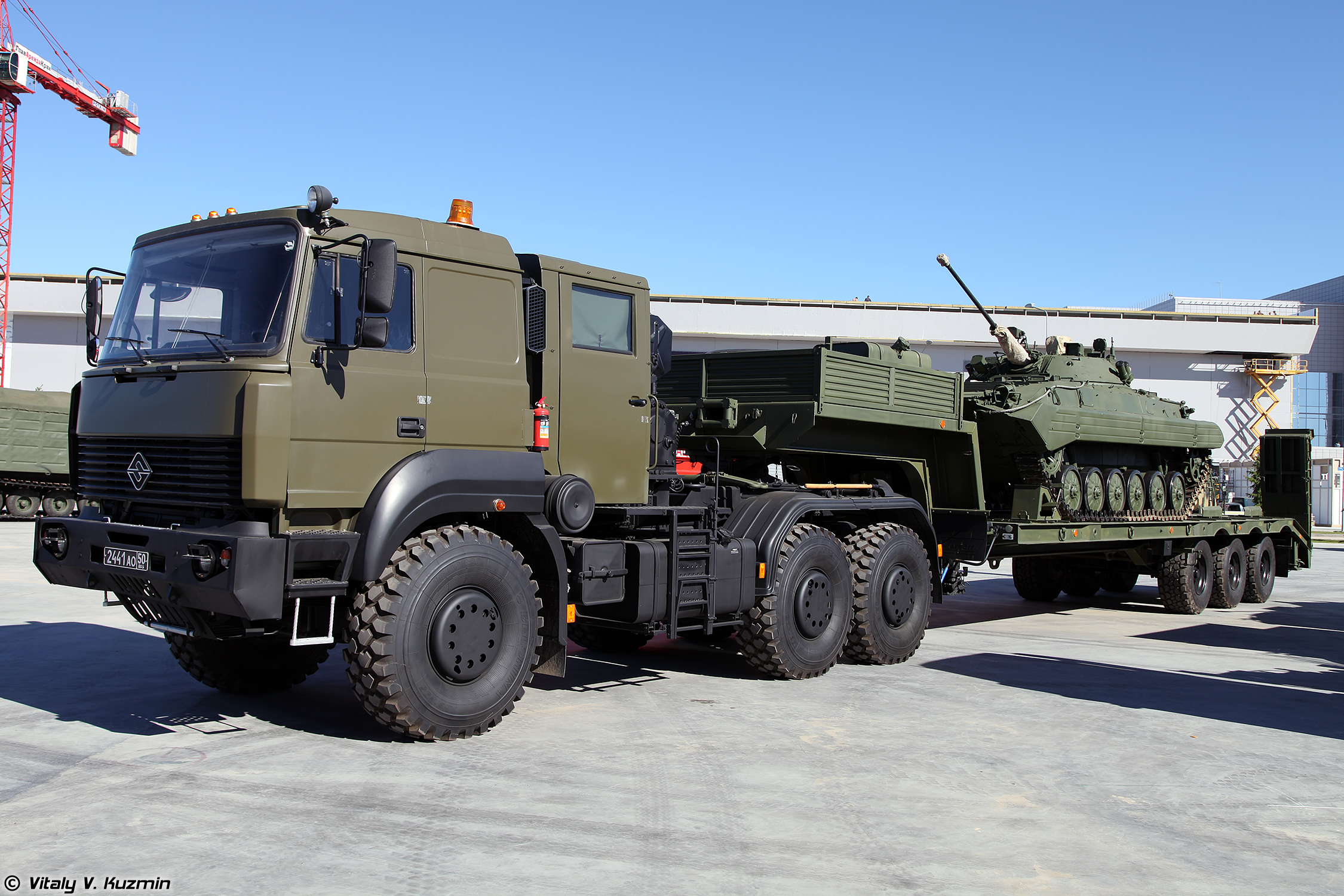 Седельный тягач Урал-63704 с полуприцепом ЧМЗАП-9990-0000073-03 (Ural-63704 tractor unit with ChMZAP-9990-0000073-03 trailer and BMP-2)